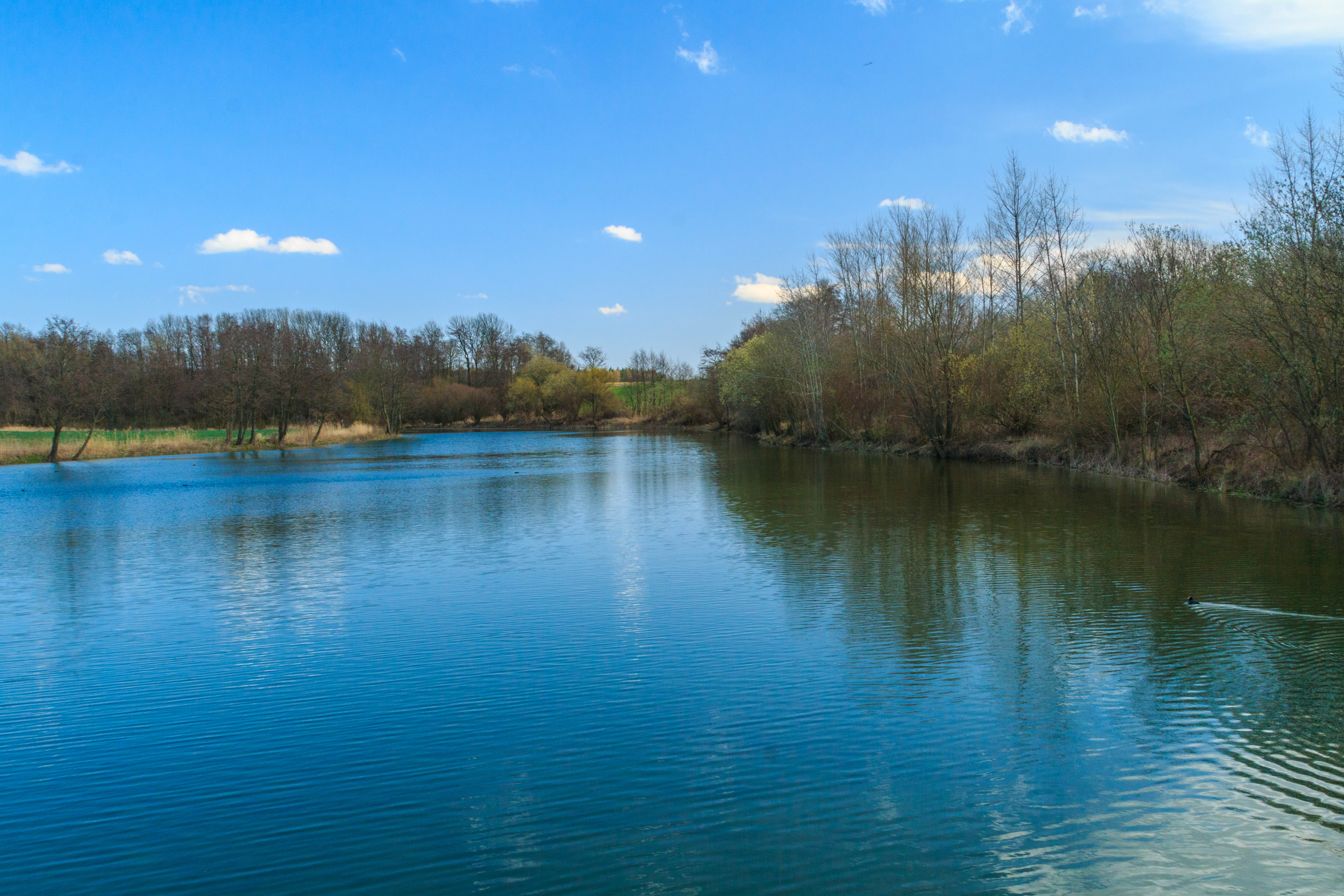 Táborský rybník u Barchova Project: Vodstvo.